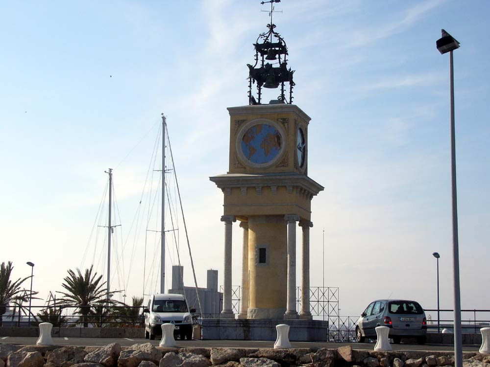 Torre-rellotge del puerto de Tarragona